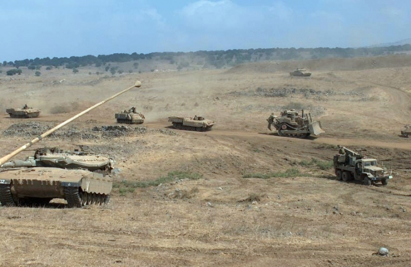 Israel Defense Forces ground forces in Brigade 188 training כוחות היבשה של צה"ל במהלך תרגיל חטיבתי של חטיבה 188